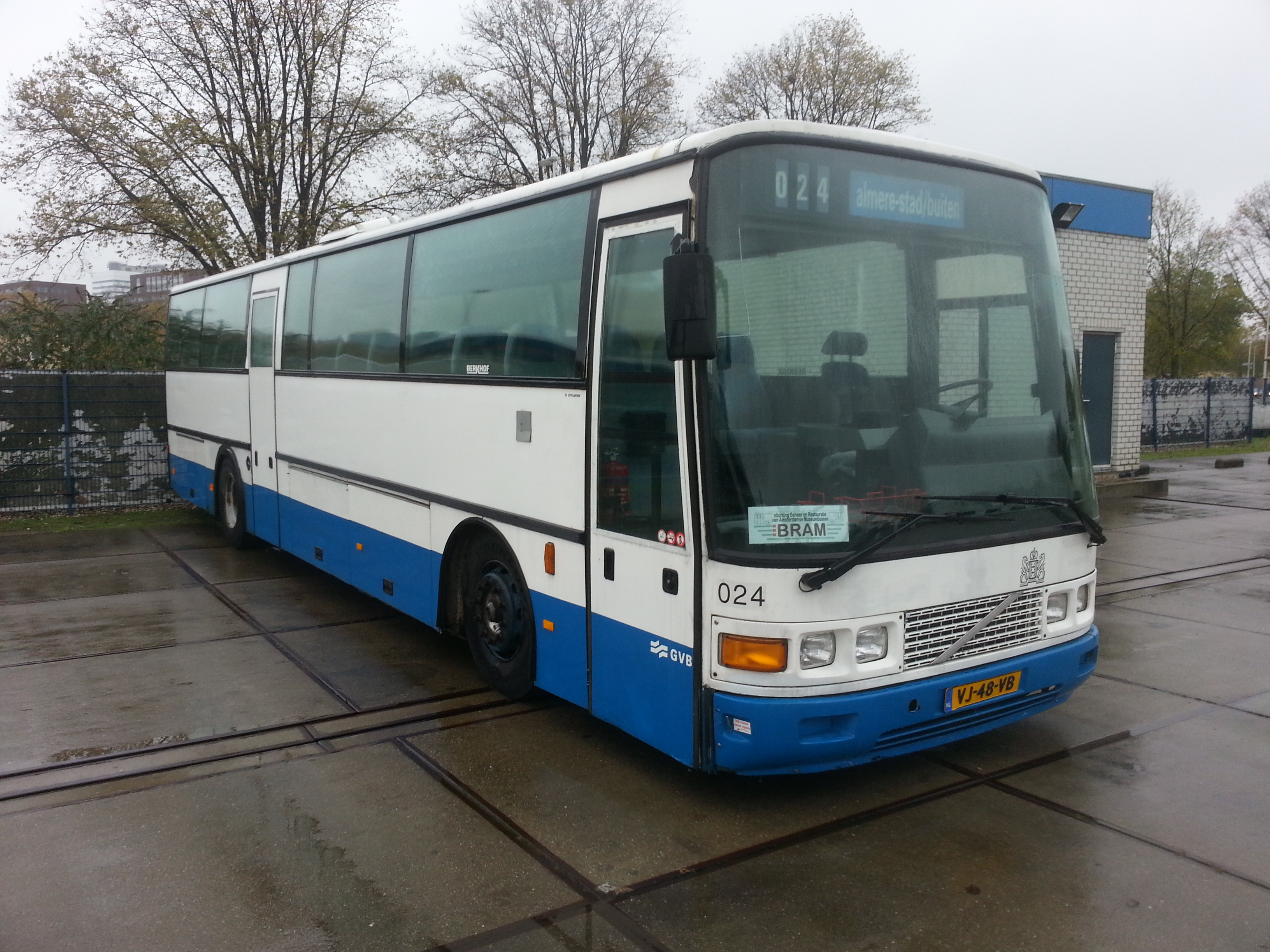 Voorzijde van de GVB 024 van de Stichting BRAM